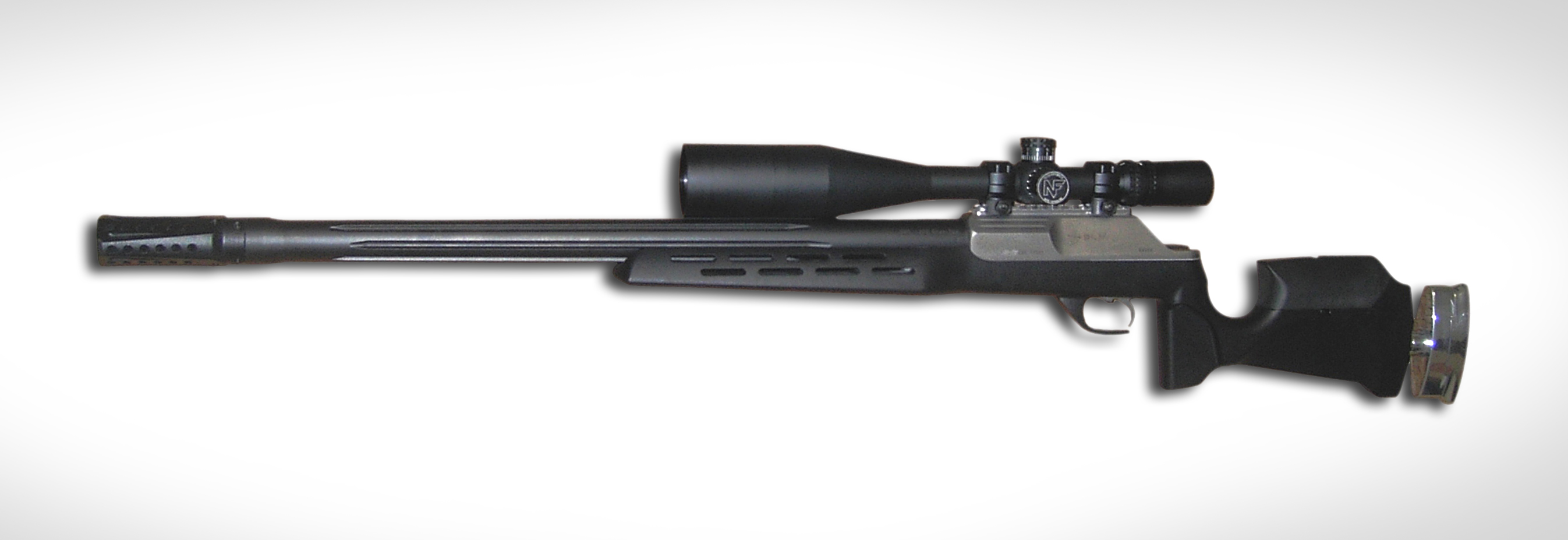 un lato dell' Extreme